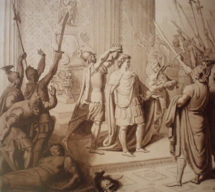 Սմբատ Բագրատունին թագադրում է Արտաշեսին, հեղ.` Ջ. Ֆուզարո